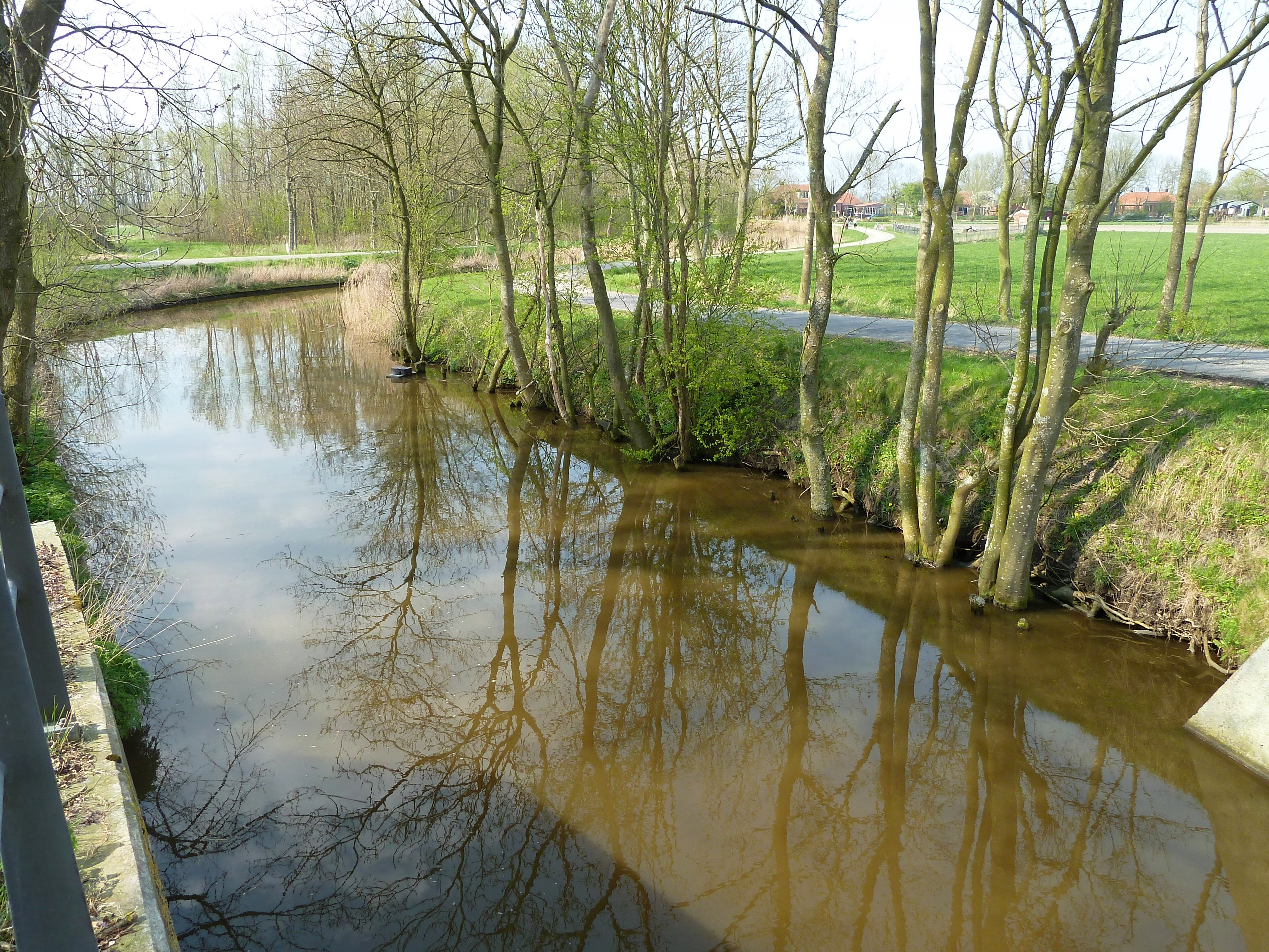 Gezicht over het Warfhuister Loopdiep vanaf de Douwertil (brug) bij Douwen (De Marne, Groningen, Nederland). 't Stort is zichtbaar op de achtergrond.